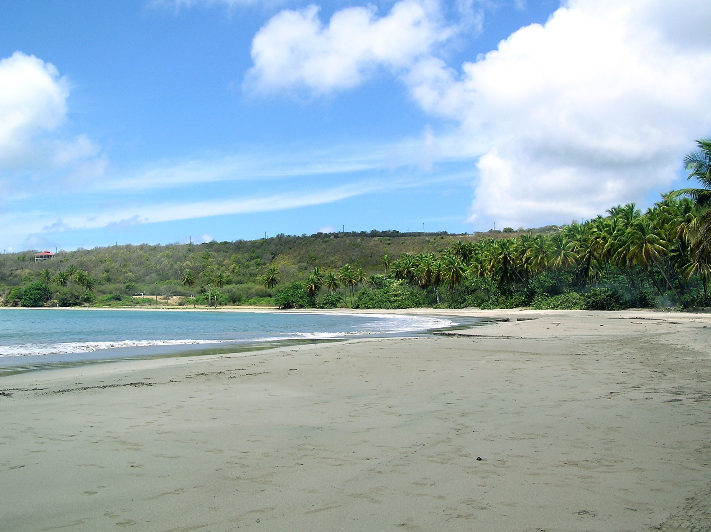 Grenada La Sagesse